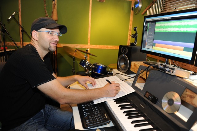 רמי שולר הוא מוזיקאי ישראלי. בתמונה מצולם בסטודיו שלו